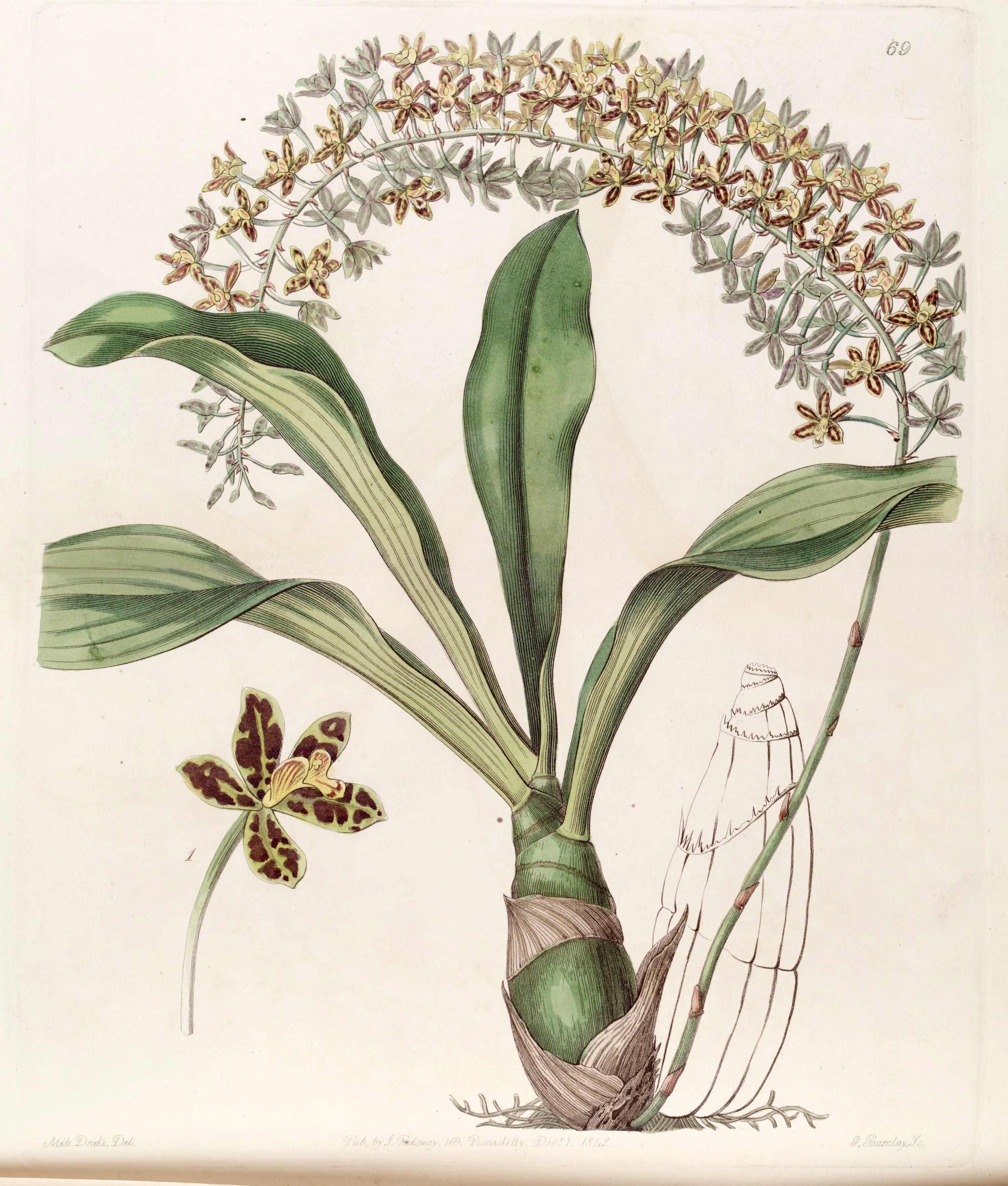 Grammatophyllum scriptum var. scriptum (as syn. Grammatophyllum multiflorum var. tigrinum)